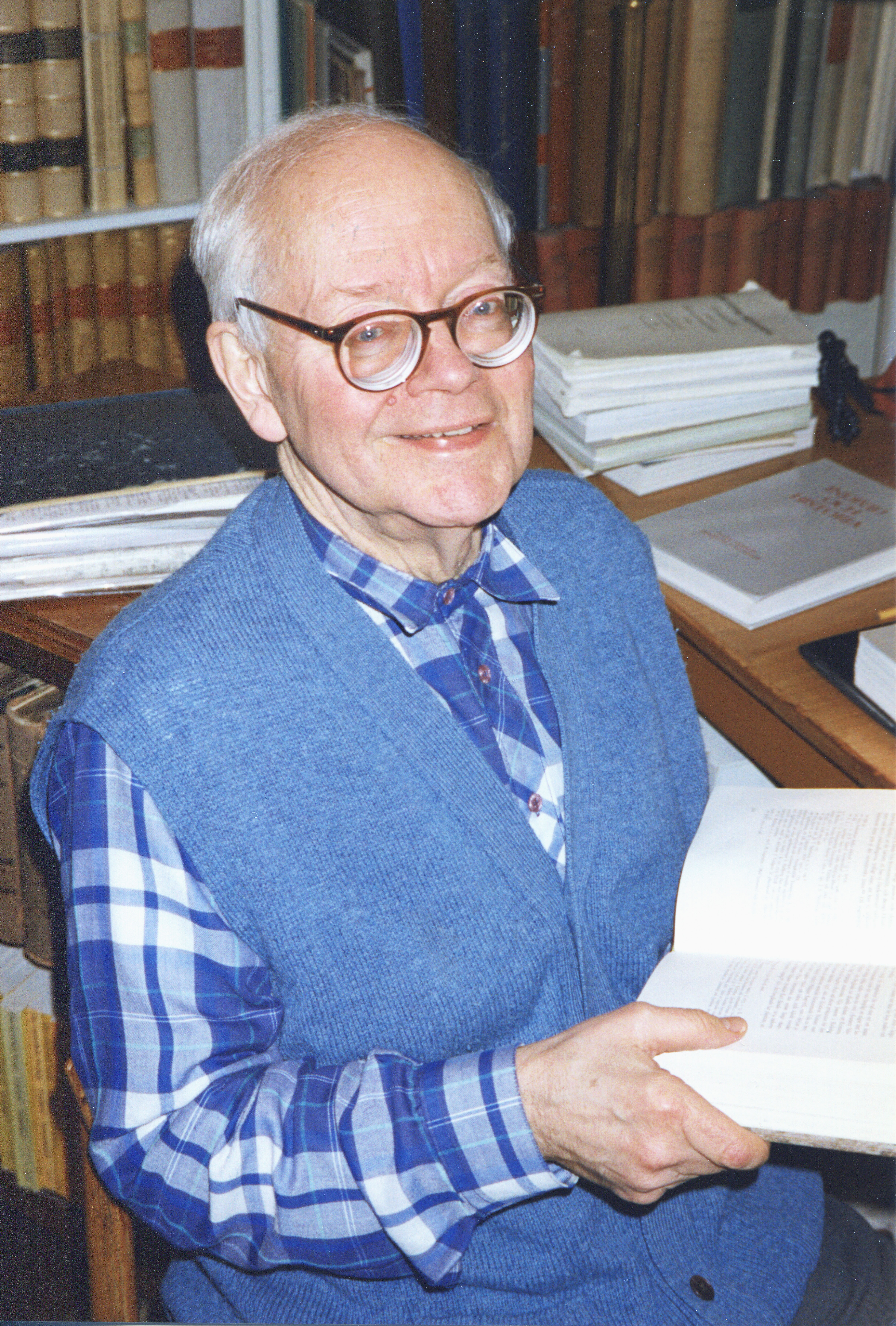 Hans Gillingstam, fil dr och redaktör vid Svenskt biografiskt lexikon, i sitt arbetsrum i hemmet i Solna i december 1997. Foto: Urban Sikeborg.